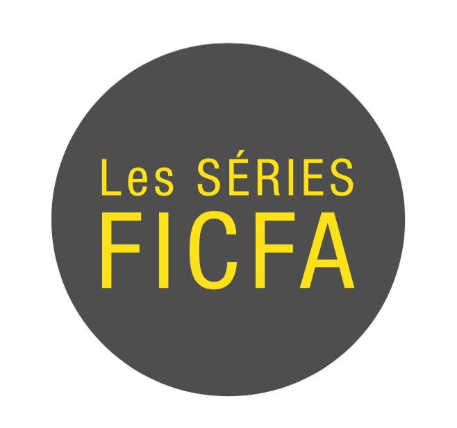 Logo de Les séries FICFA